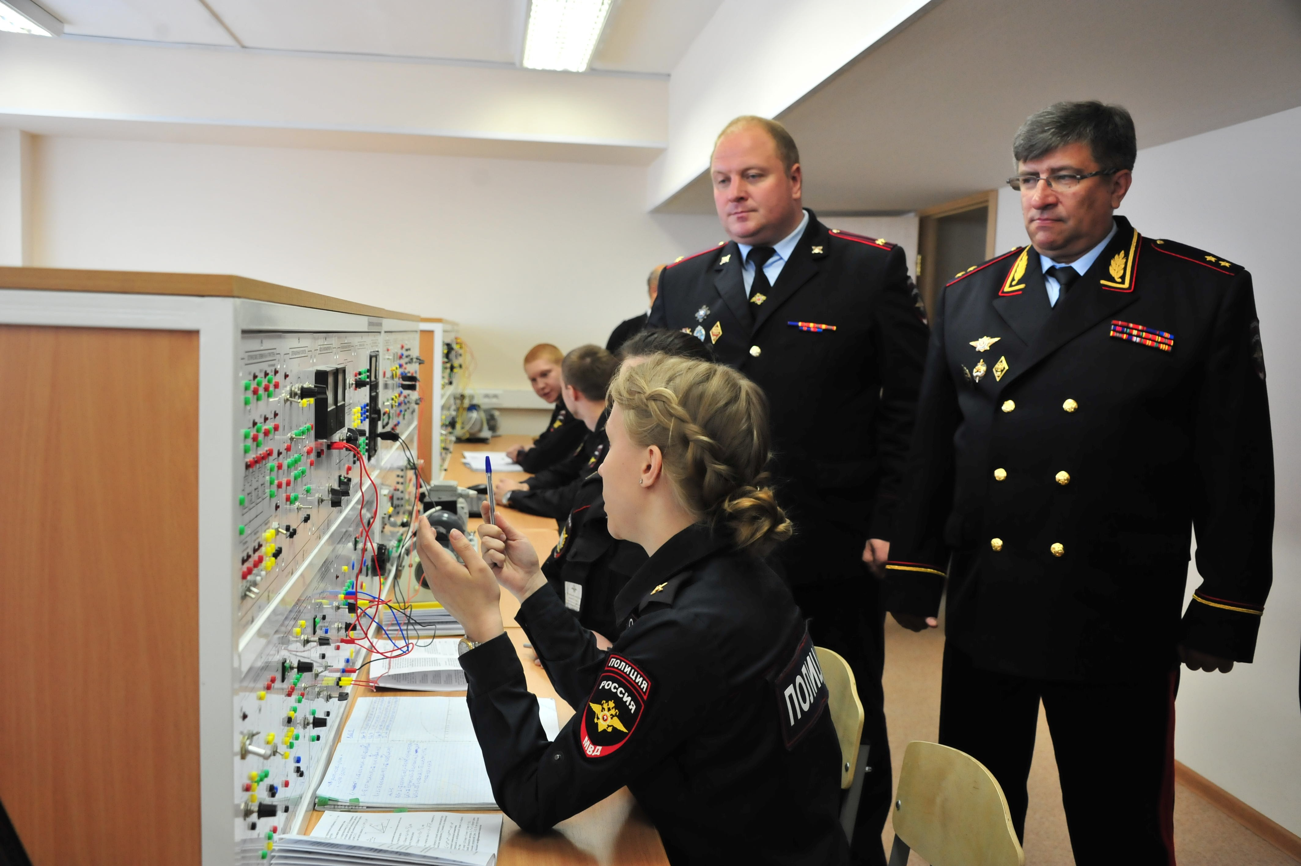 Полигонно-лабораторная база учебно-научного комплекса информационных технологий